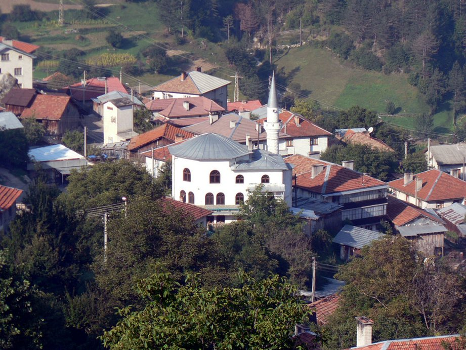 Джамията в село Гьоврен.